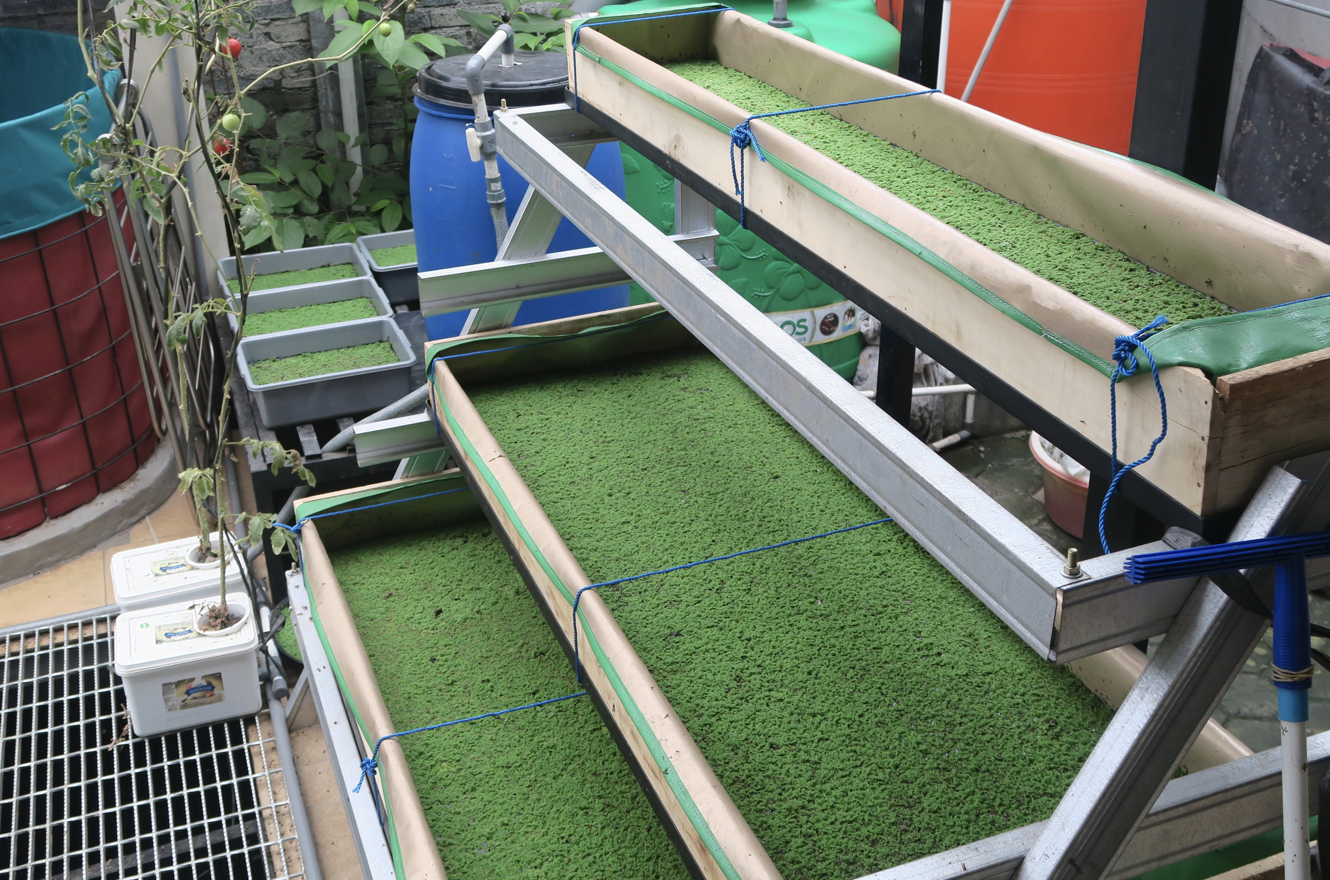 Kolam azolla merangkap hidroponik.